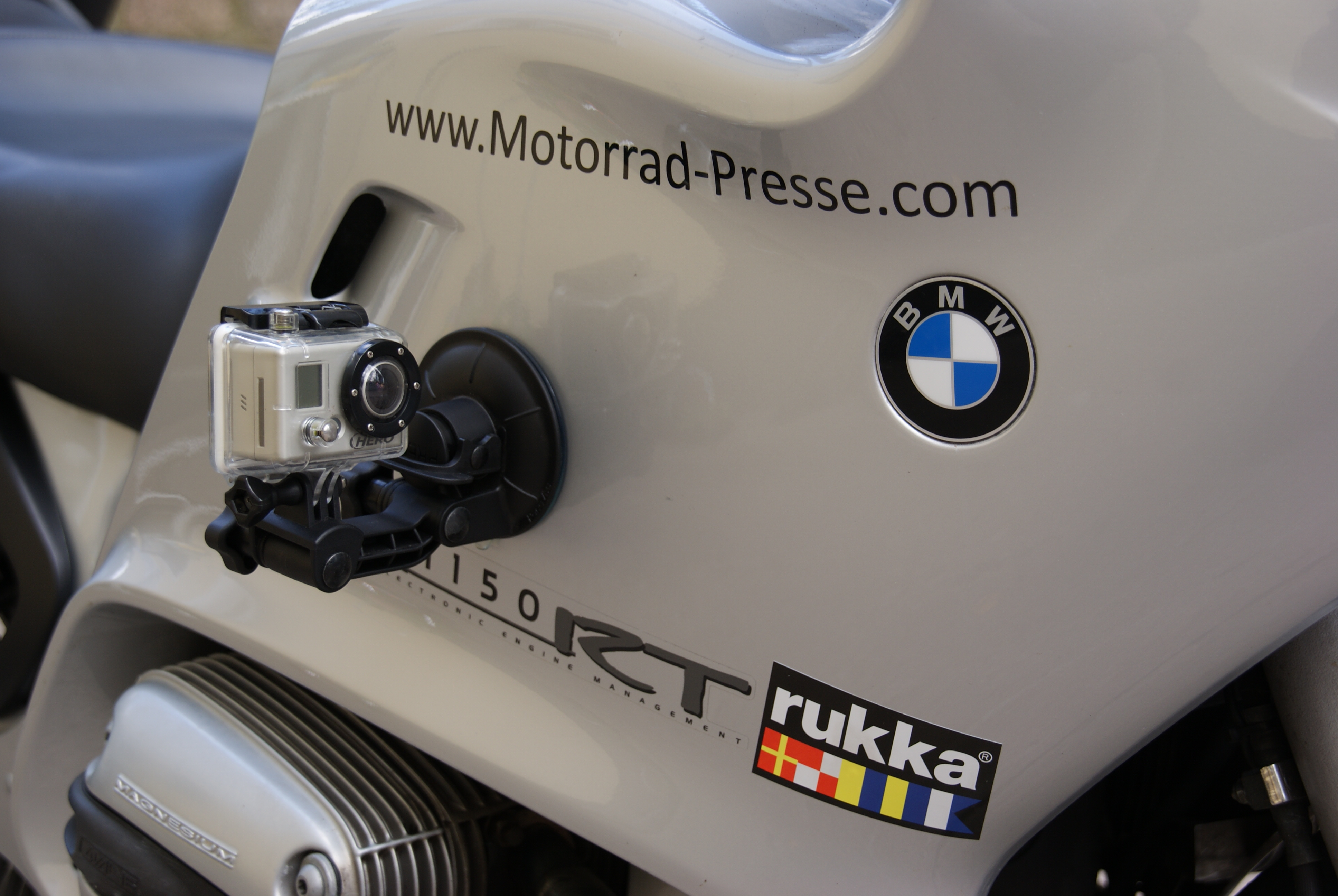 Vergleichstest Action-Cams auf ©